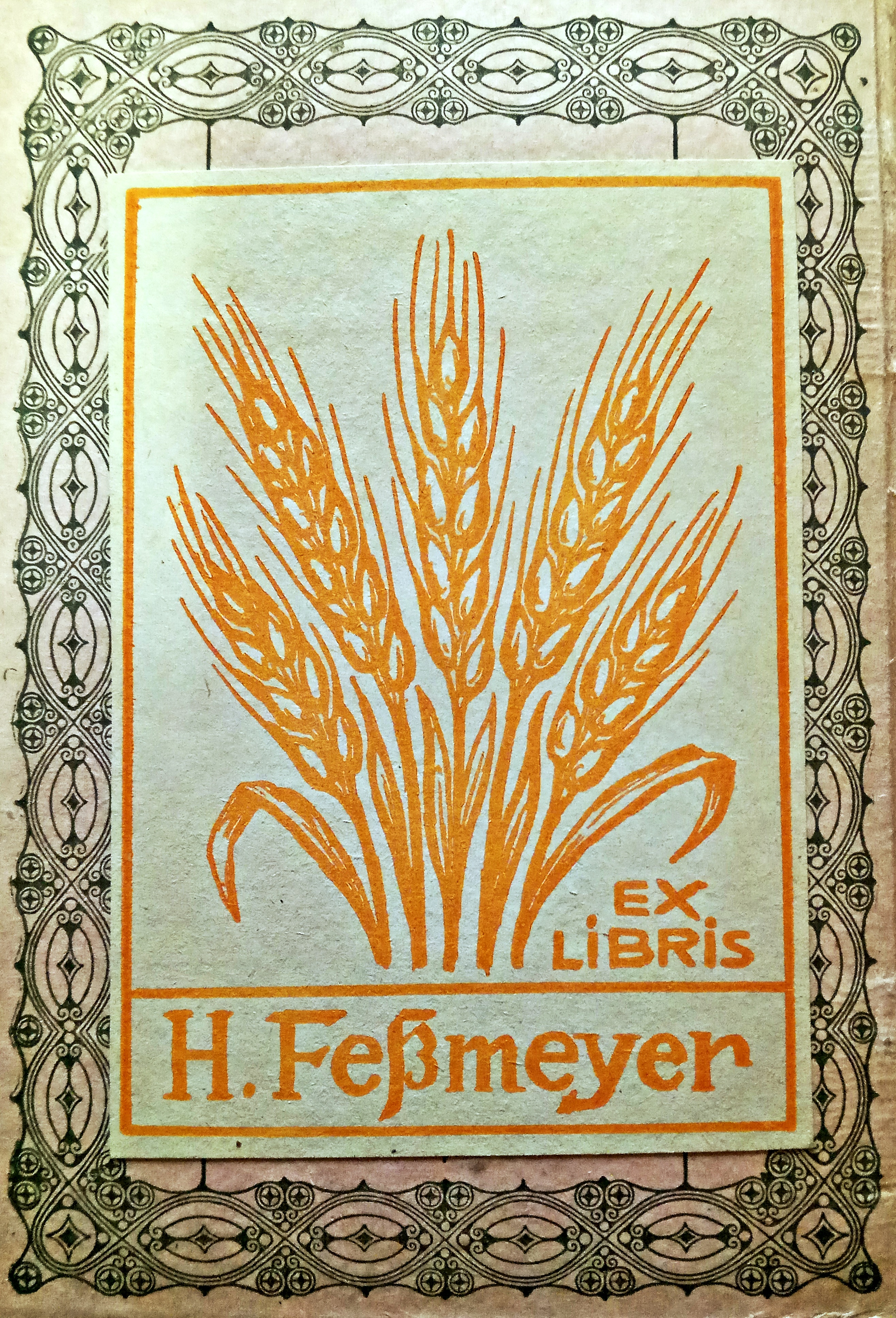 Exlibris für Hans Feßmeyer, Heimatkundler und Lehrer Grünstadt, unbekannter Künstler, 1920 (eigenes Foto vom eigenen alten Buch)